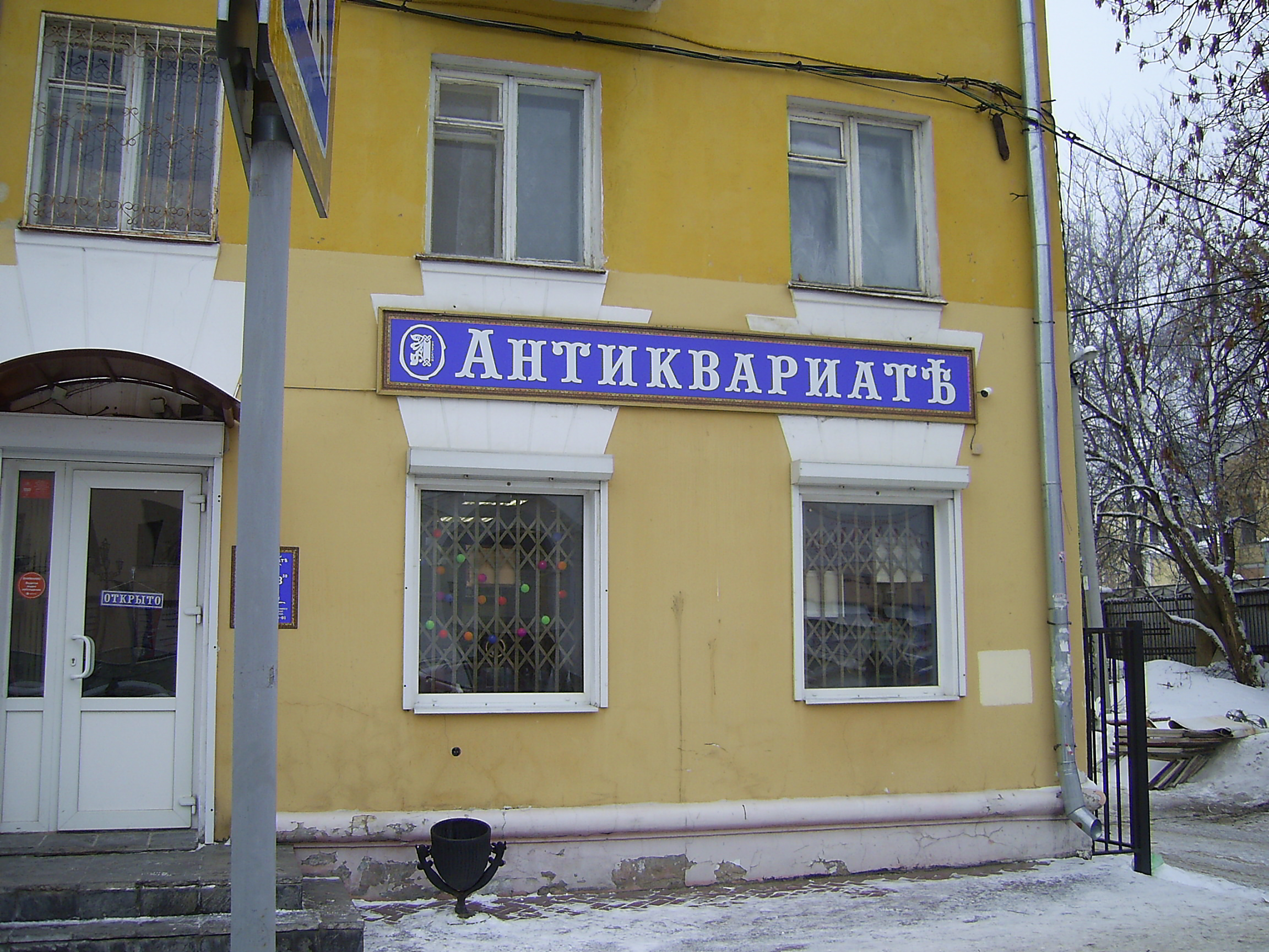 Неправильный вариант написания слова "АНТИКВАРИАТ" дореформенной орфографией (АНТИКВАРИАТѢ вместо АНТИКВАРIАТЪ). Россия, г. Тверь